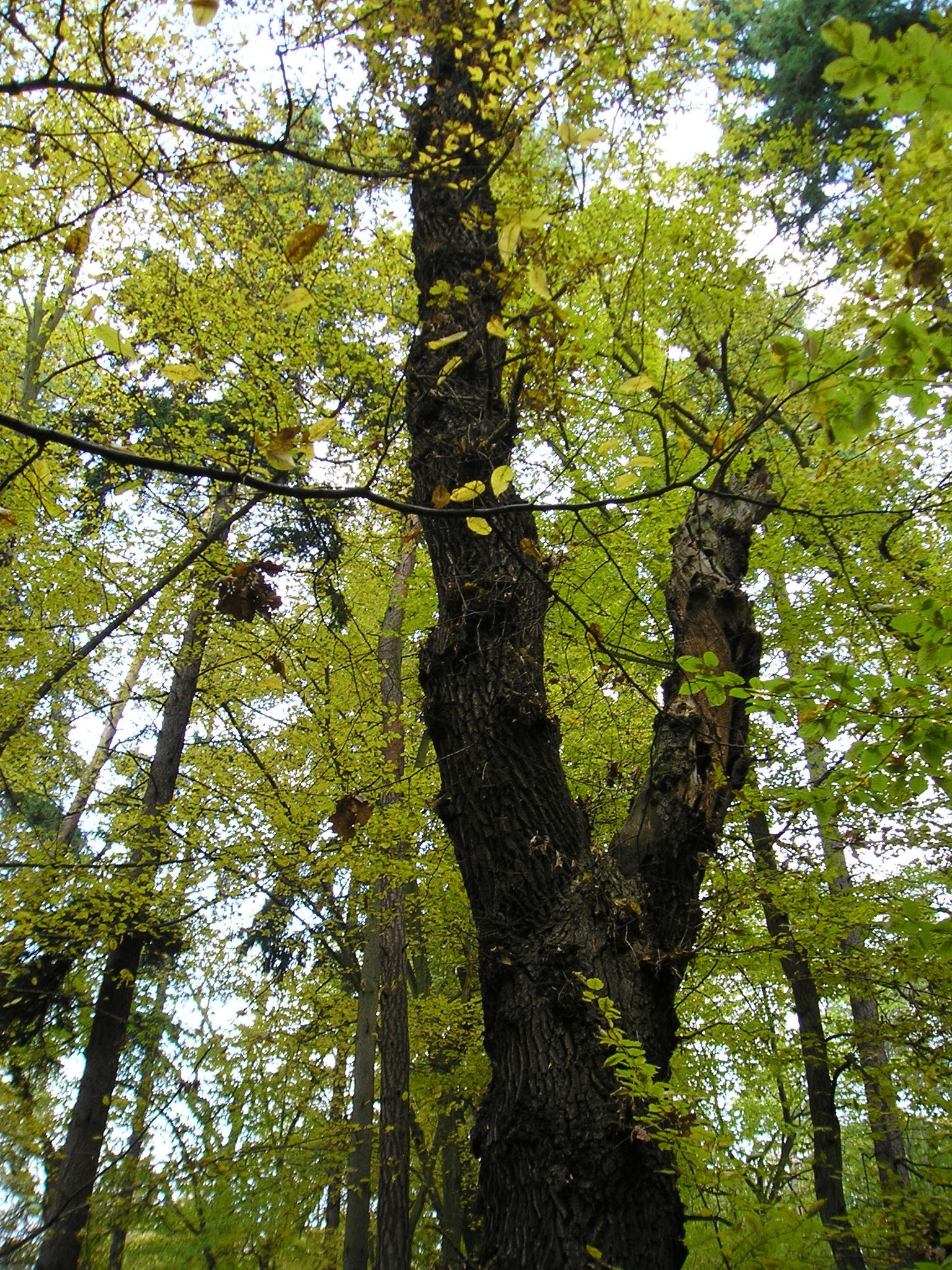 Torzo mrtvého dubu (Quercus). Přirozené prostředí pro vývoj larev páchníka hnědého (Osmoderma eremita)